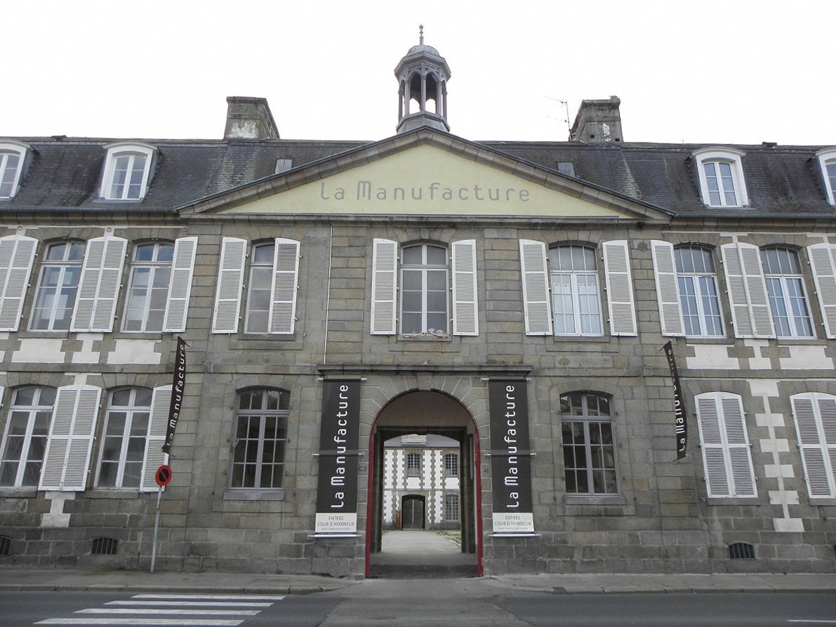 Façade principale de la Manufacture des tabacs de Morlaix (29).